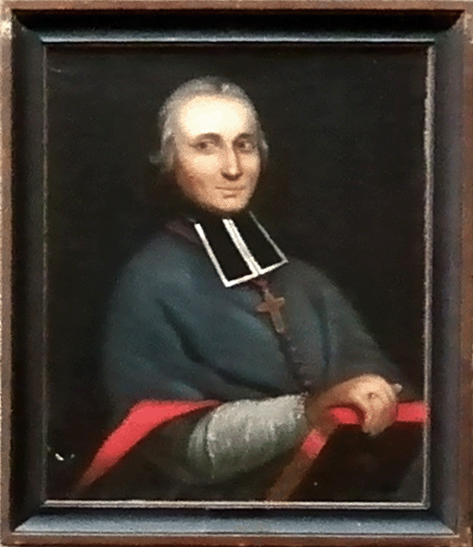 Poltred en iliz-veur Landreger